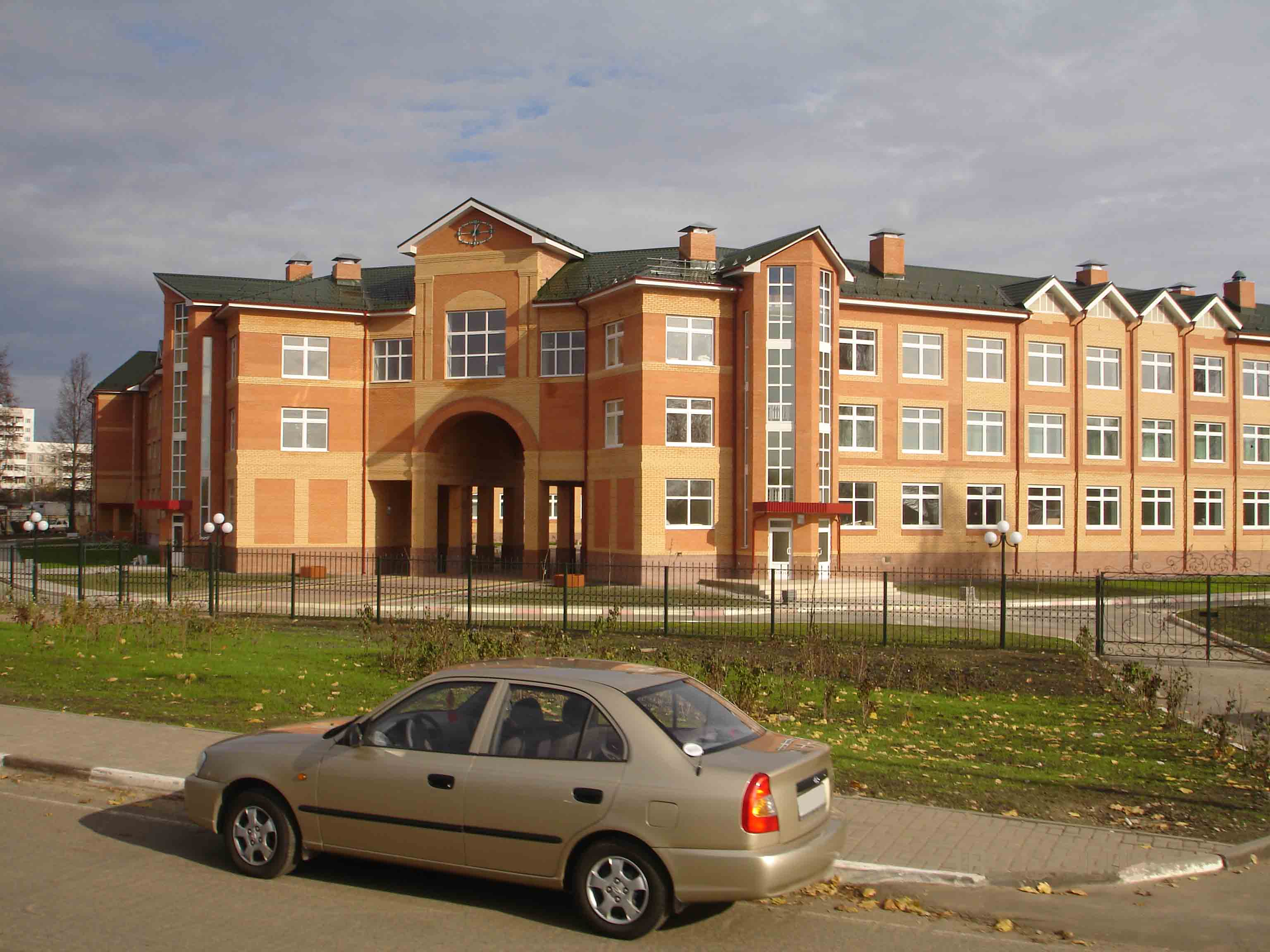 Новое здание школы №12